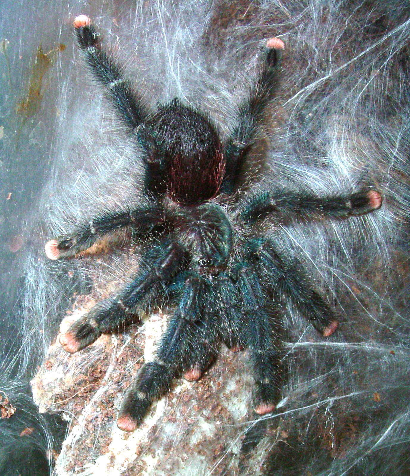 Avicularia metallica Fotograf: Viki first upload in de wikipedia on 21:59, 29. Dez 2004